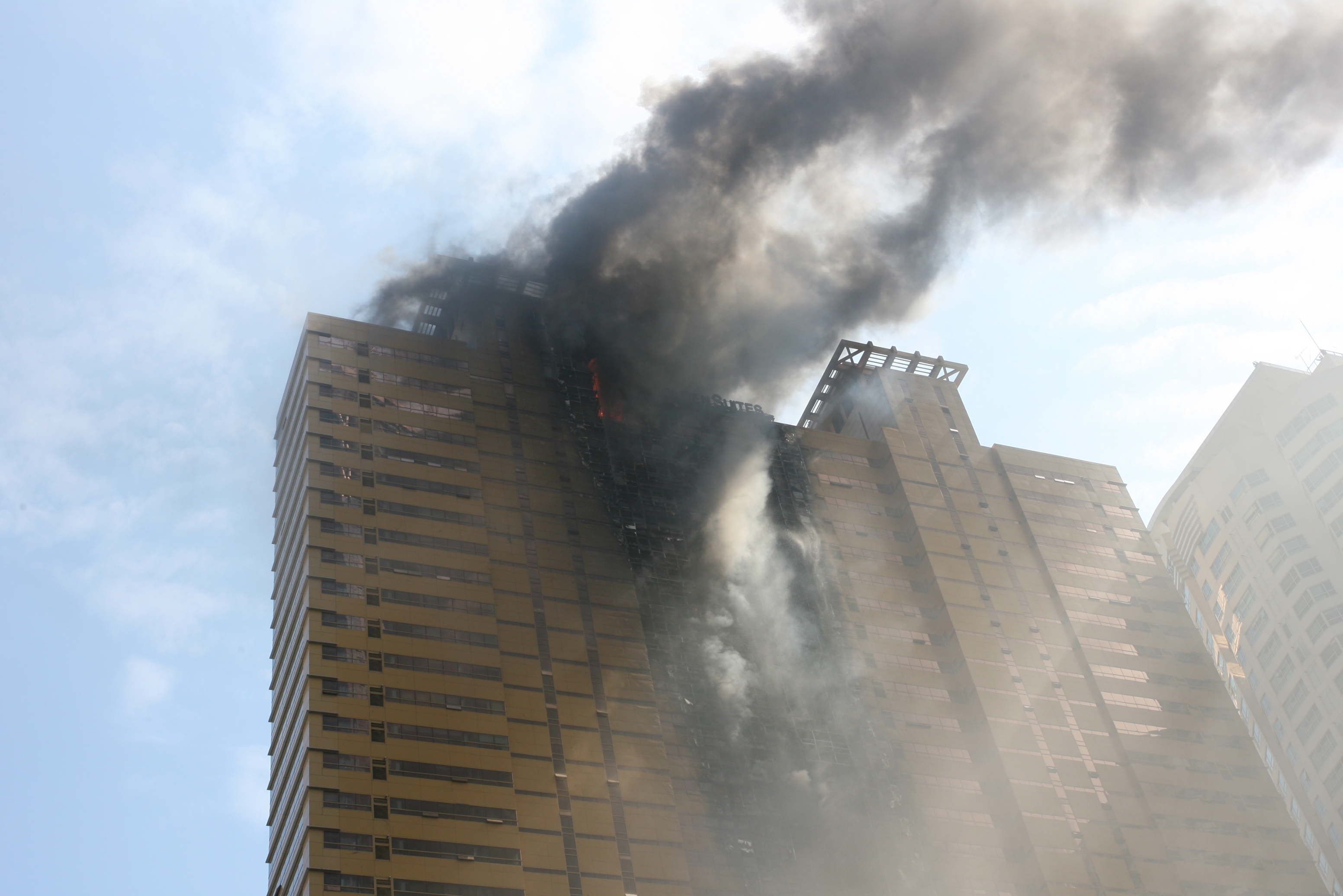 우신골든스위트 화재 사고